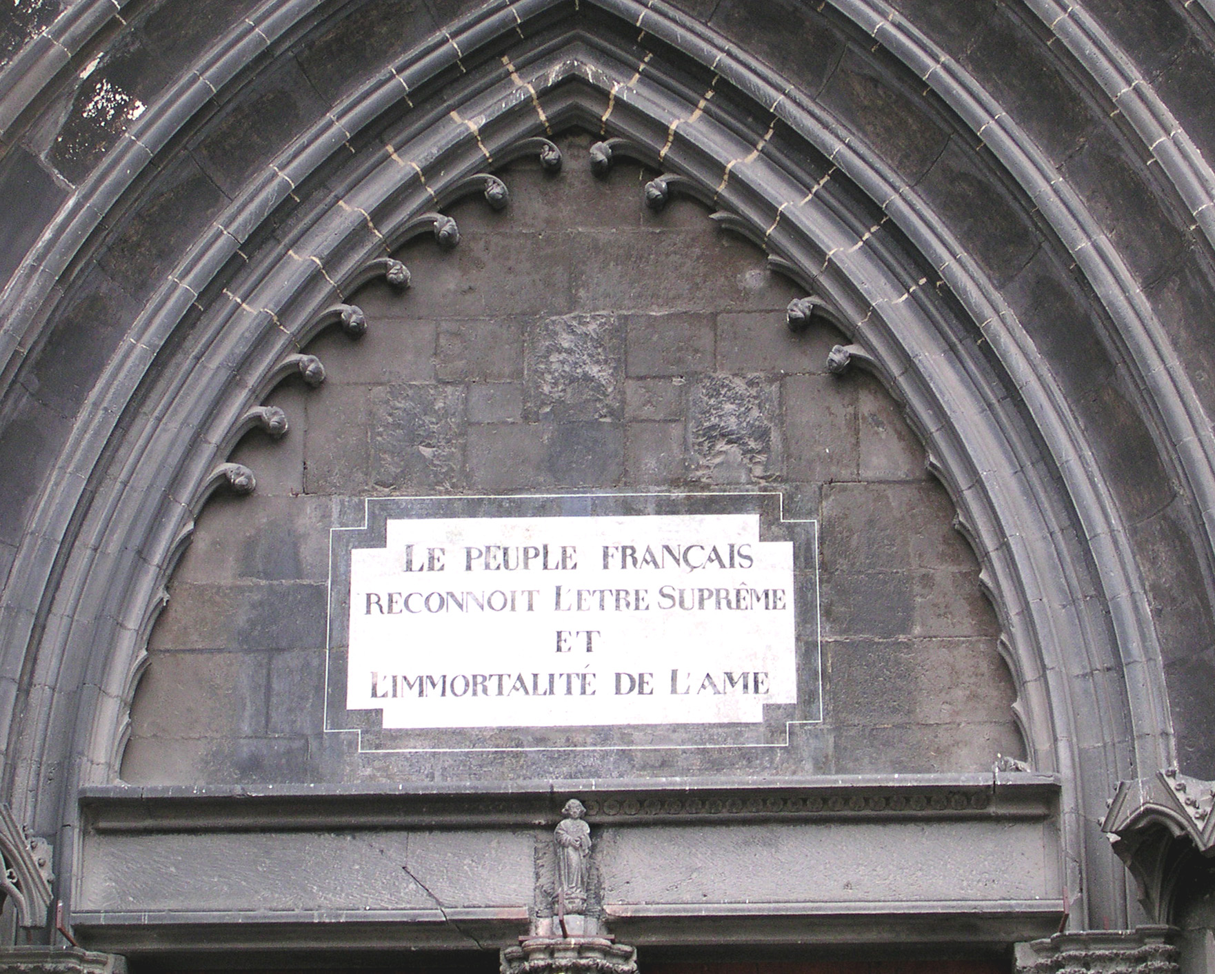 Cathédrale de Clermont-Ferrand : déclaration pour le culte de l'Étre suprème. Marquage à la peinture mis au jour lors d'une restauration de la cathédrale.